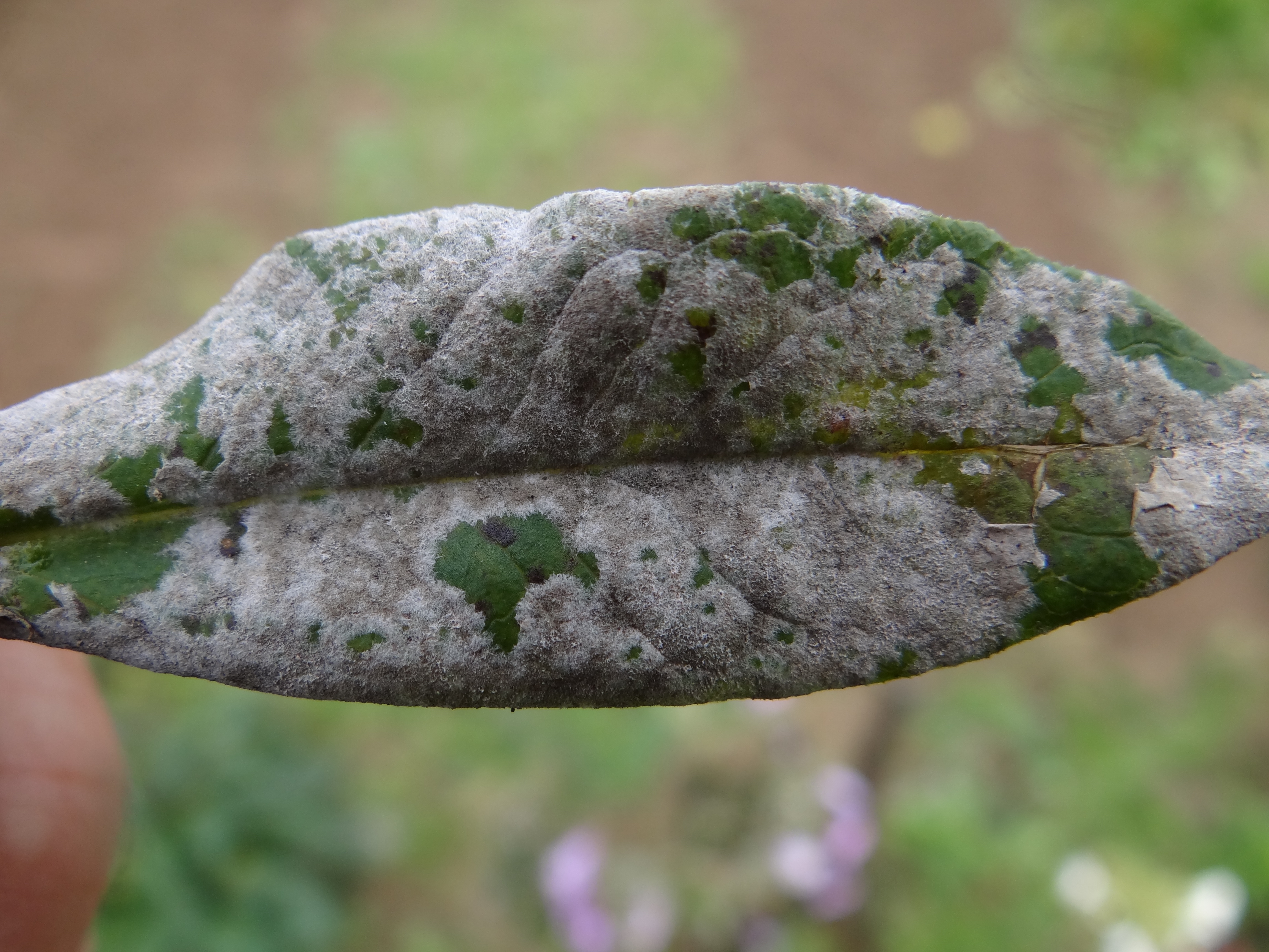 Golovinomyces magnicellulatus on Phlox panniculata